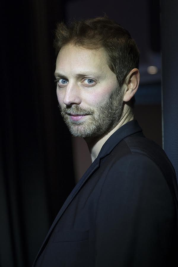 portait de Guillaume Senez